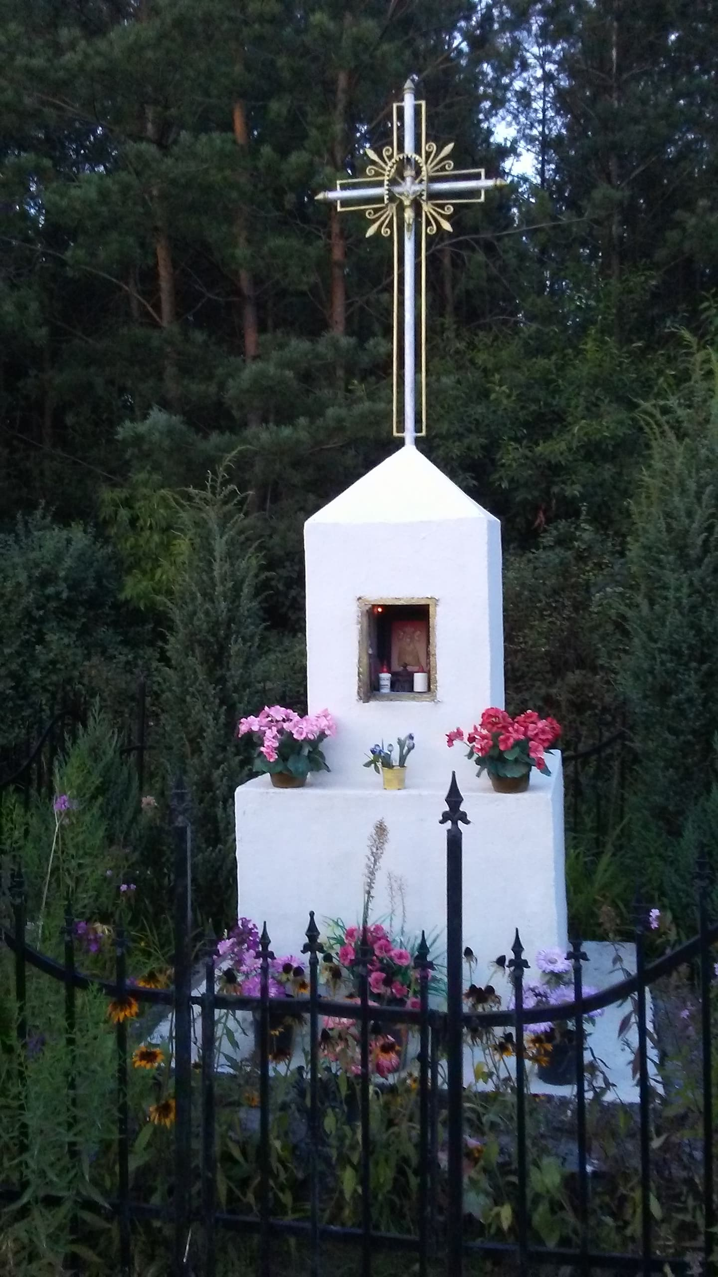 Kapliczka we wsi Nowiny Brdowskie